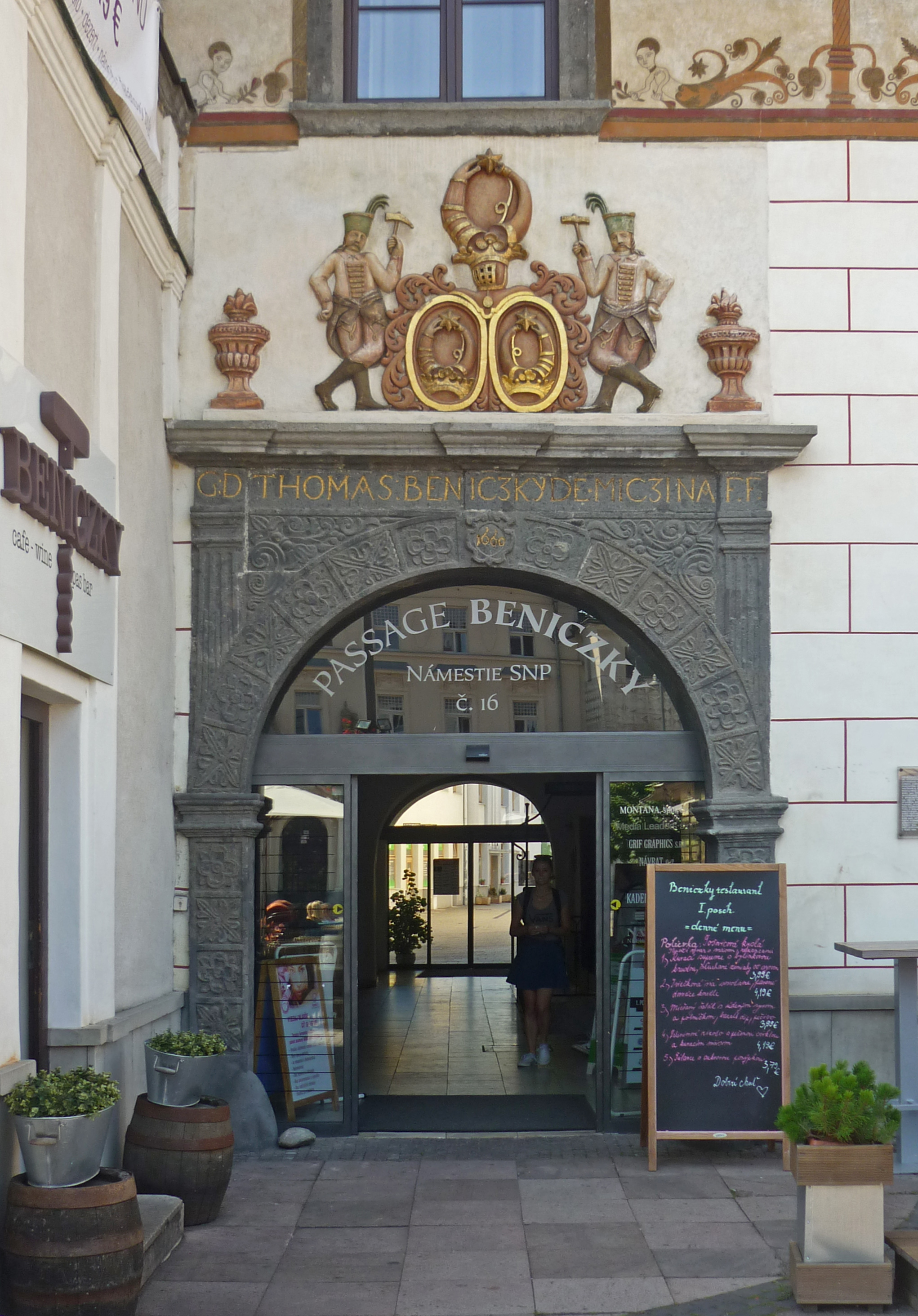 Portal am Beniczky-Haus in Banská Bystrica (Neusohl) in der Slowakei